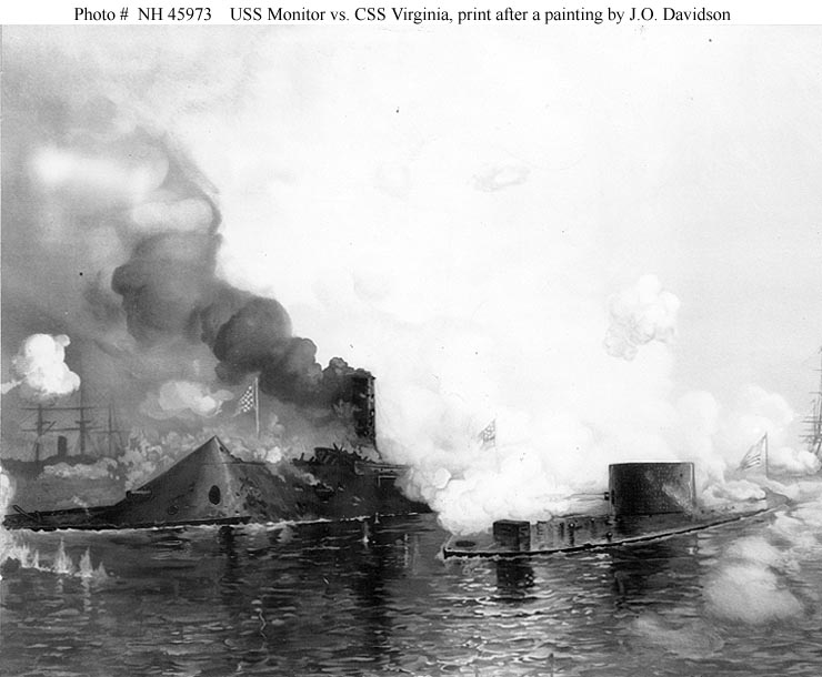 Gefecht zwischen "Monitor"(Nord) und "Virginia"(Süd) am 9. März 1862 im amerikanischen Sezessionskrieg.